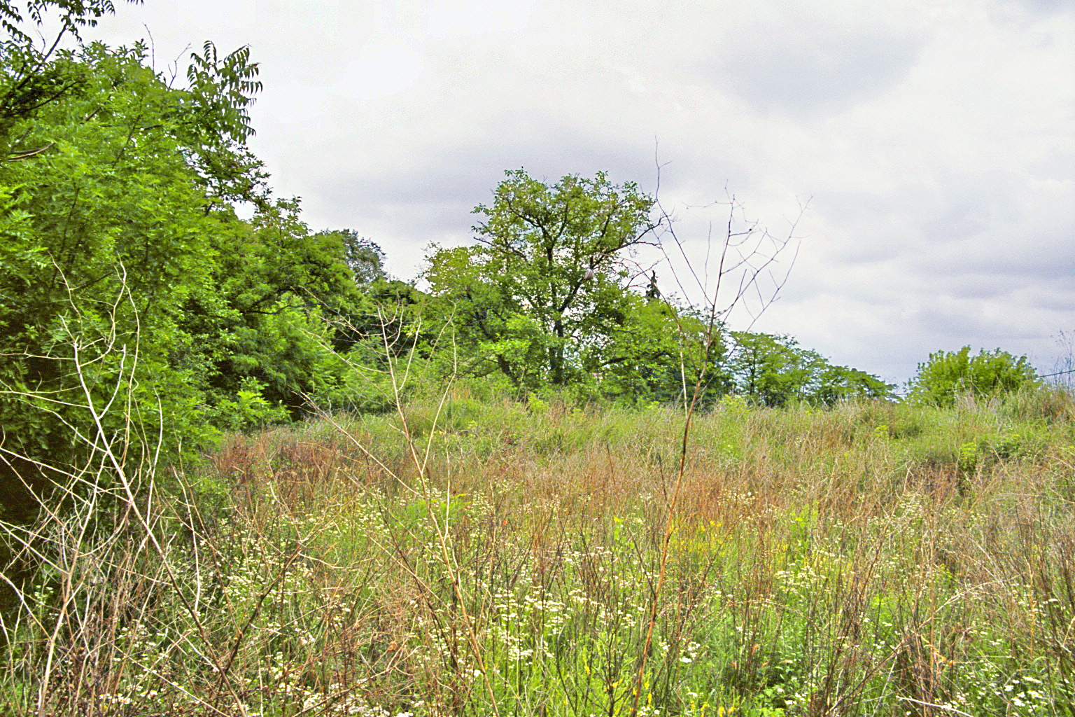 Szentendre, Ungarn: Südliches Gelände des römischen Kastells. This is a photo of a monument in Hungary, Identifier: 7397